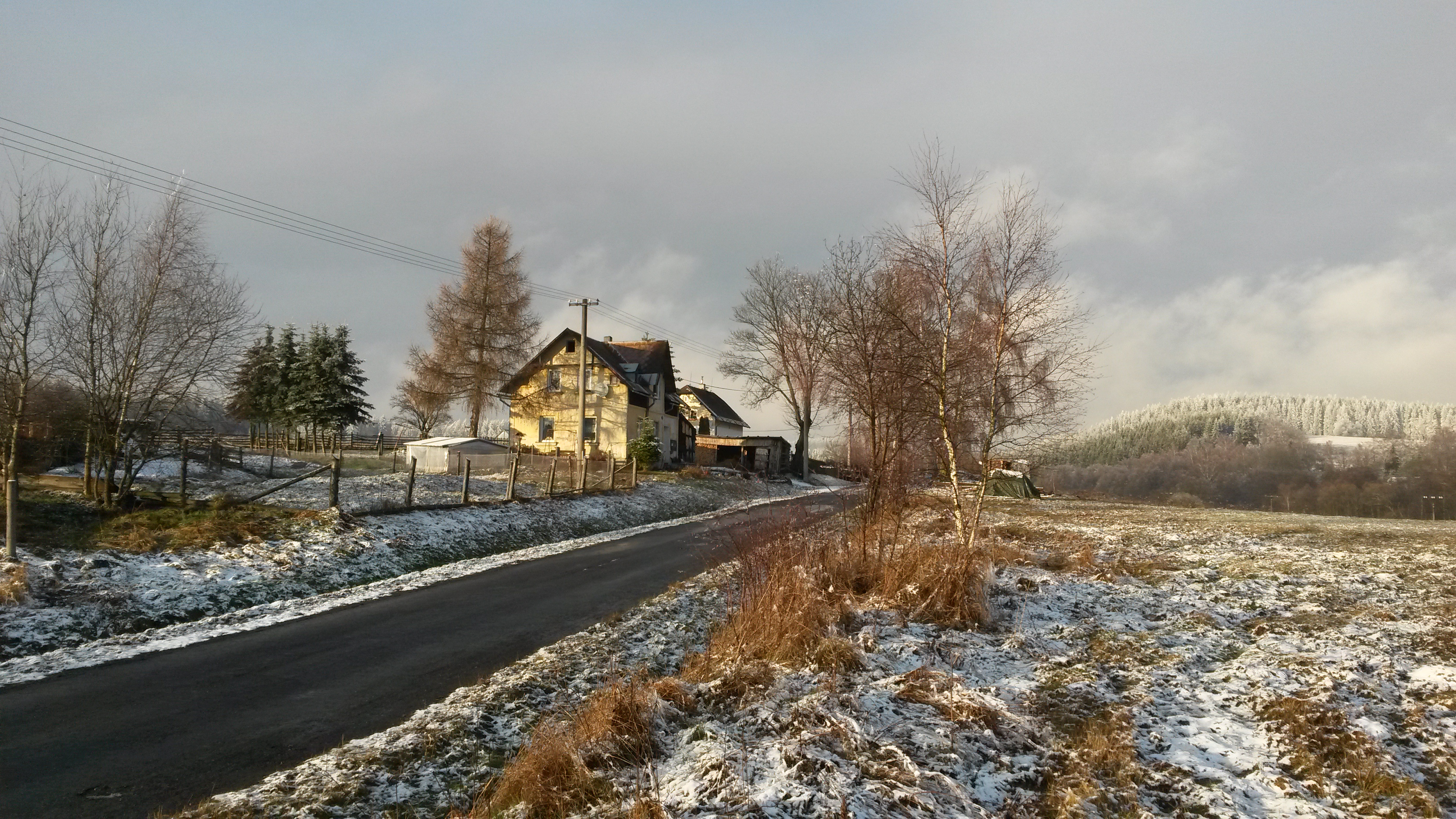 Víska spíš u Lubů, prosinec 2013